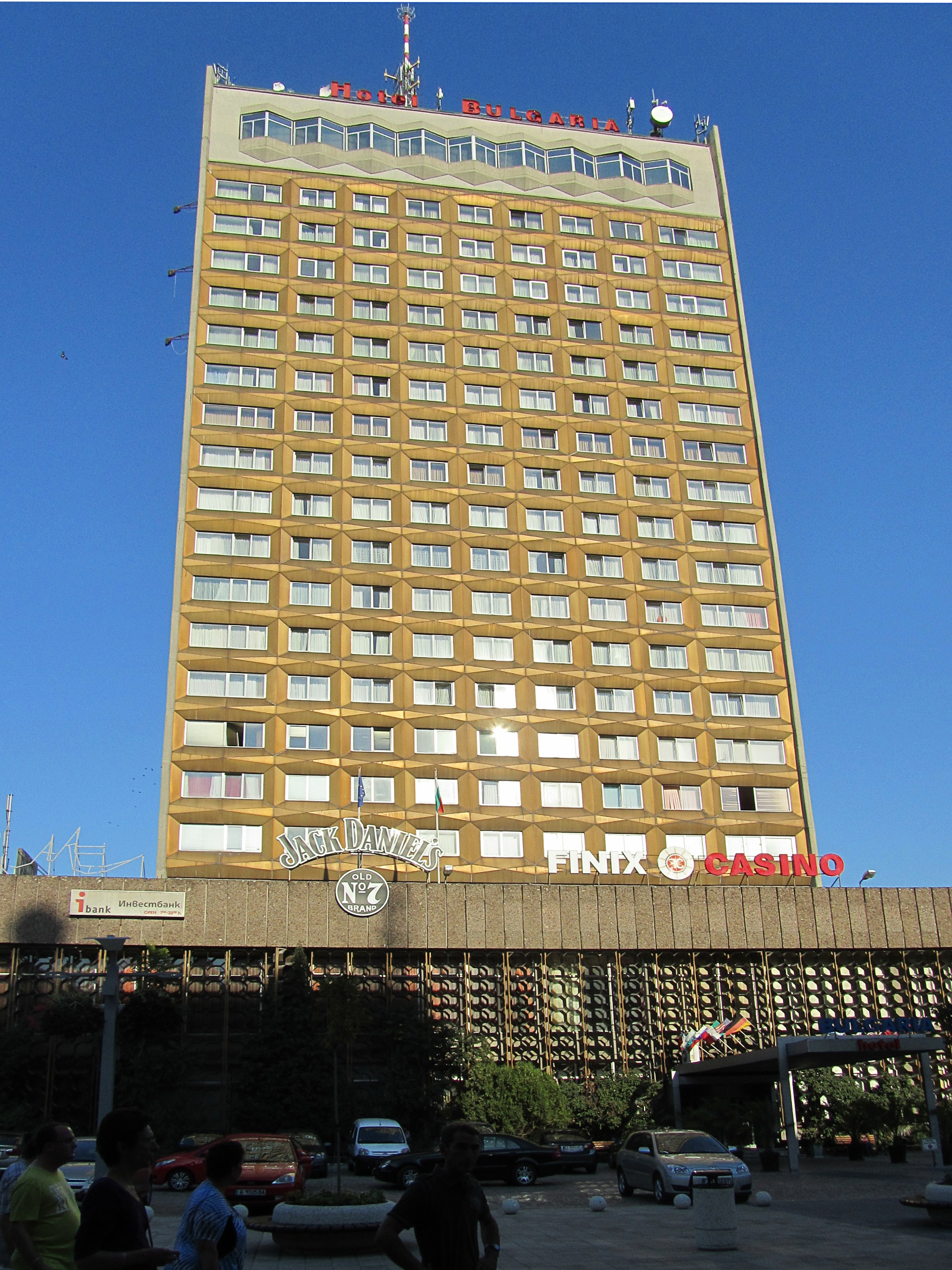 Хотел България, Бургас, България